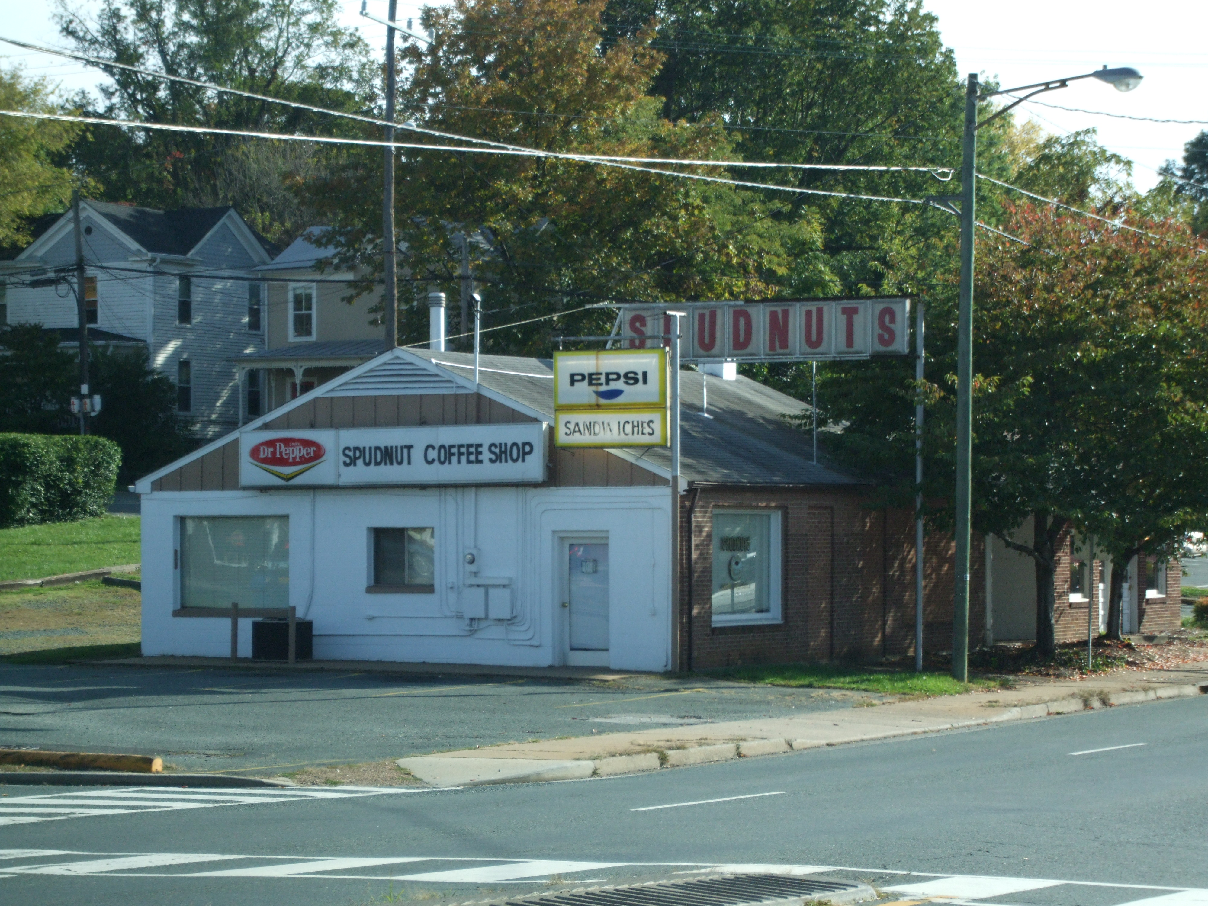 Spudnuts